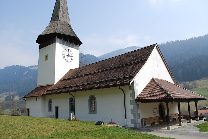 Vue de l'église de Boltigen (Simmental)